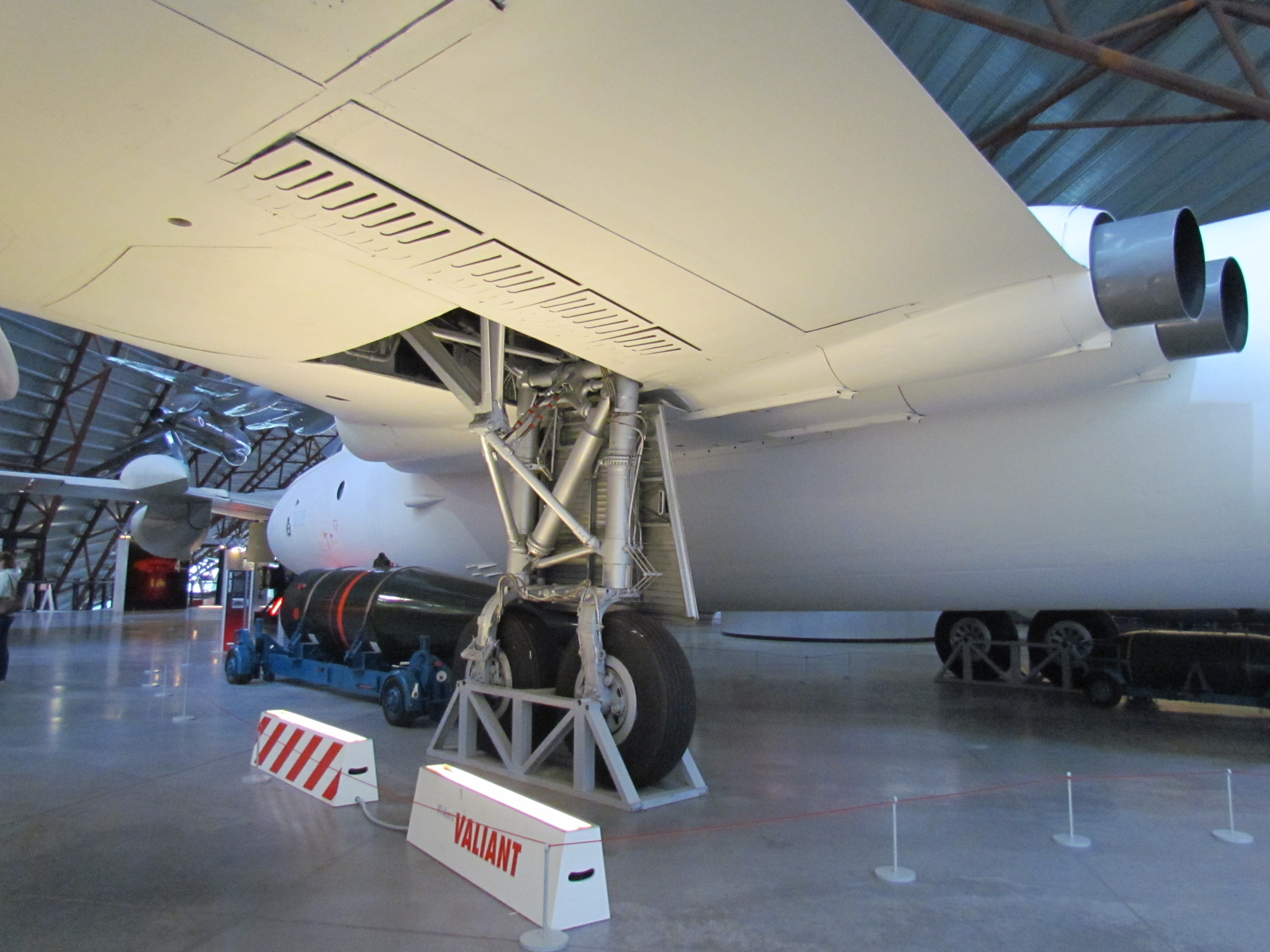 Handley Page K2